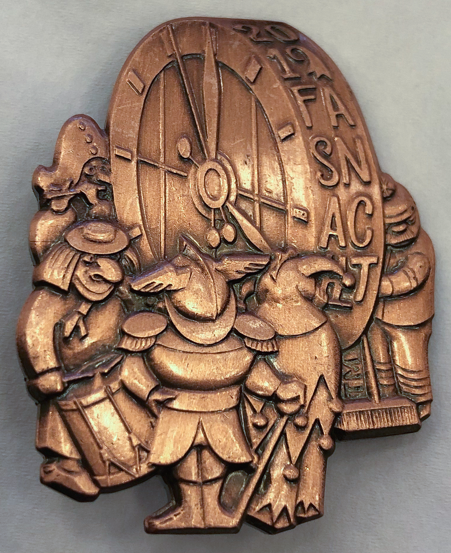 Photo prise pendant le carnaval de Bale le mardi 12 mars 2019